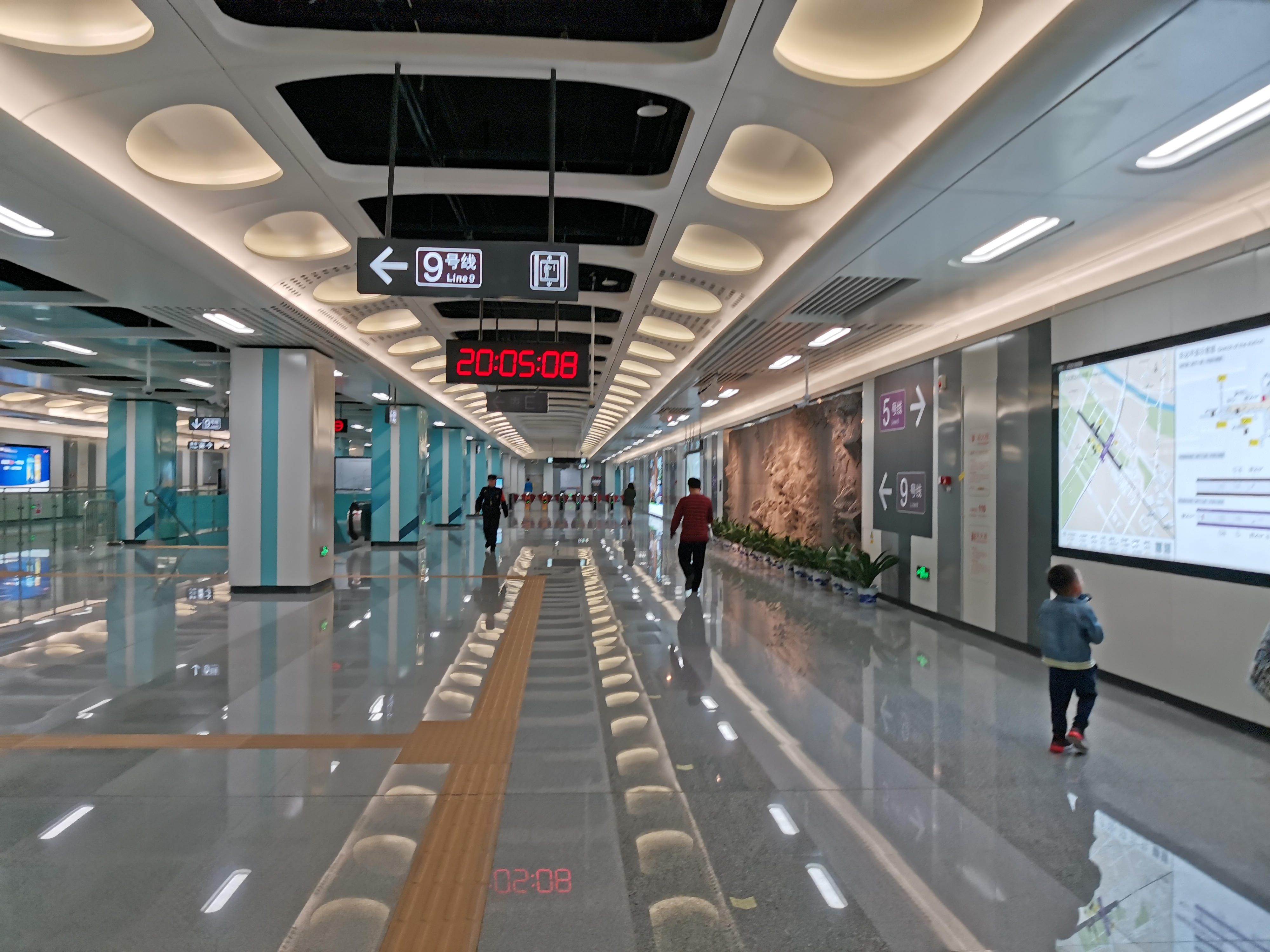 前灣站9号线站厅